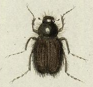 Eulasia arctos